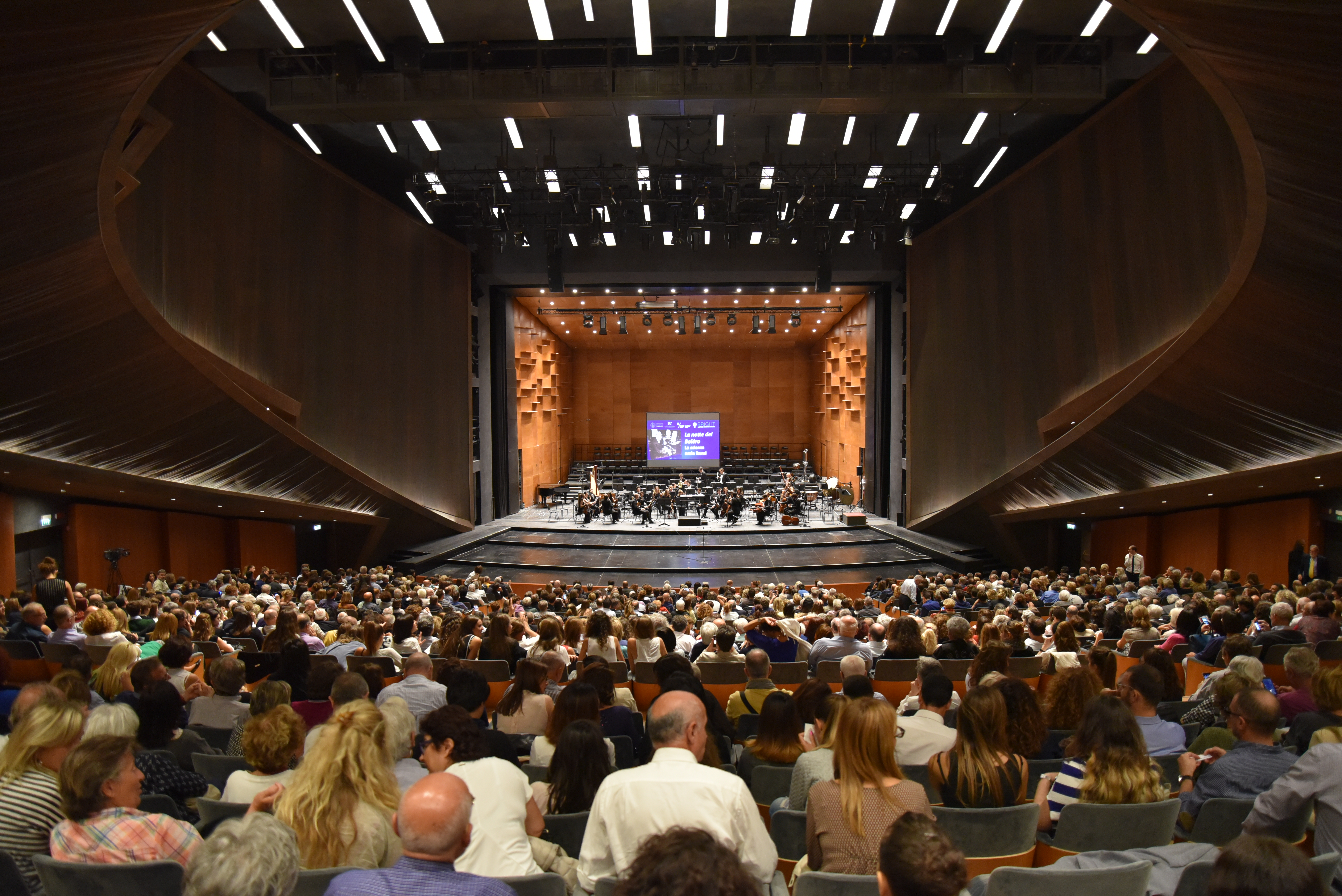 La Notte del Bolero al Teatro dell'Opera di Firenze